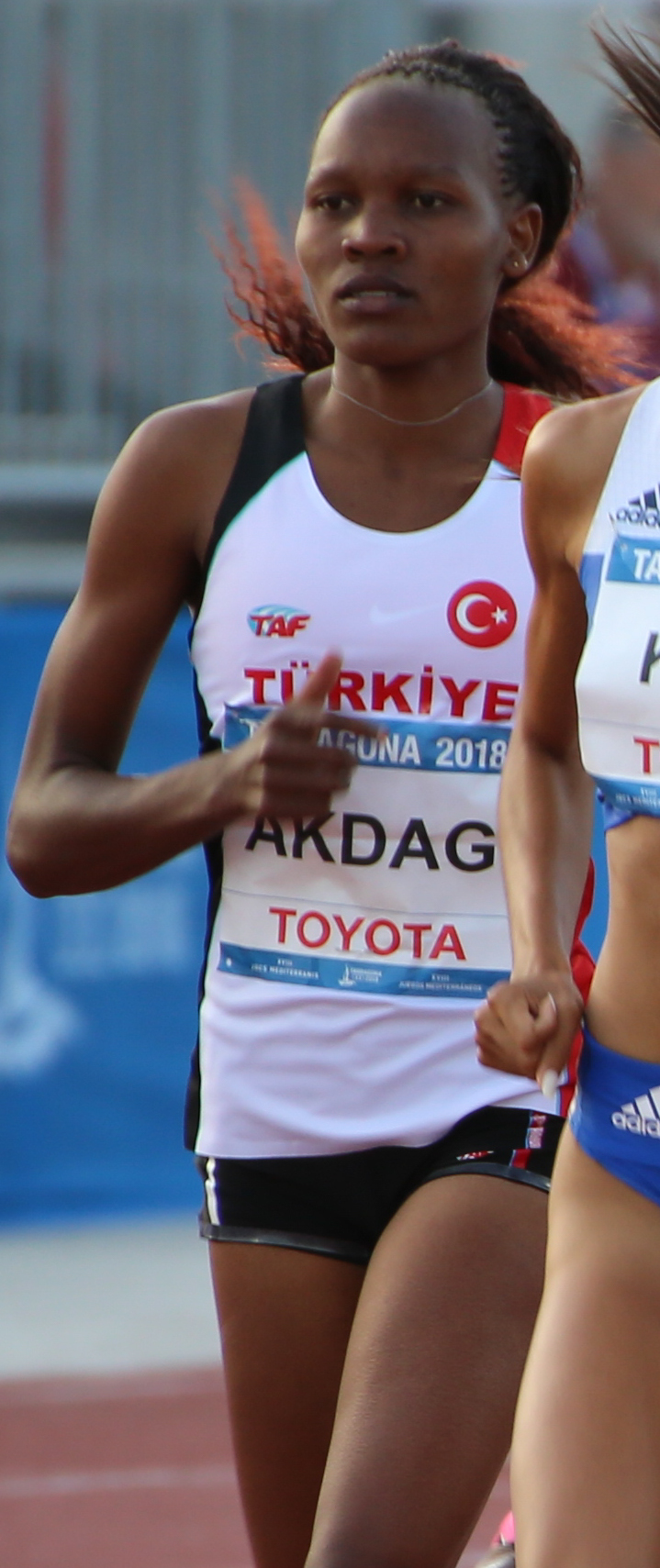 1500 metros en los Juegos del Mediterráneo 2018